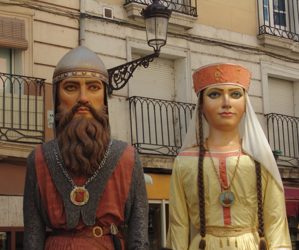 Fiestas de Burgos, los «Gigantones» Rodrigo Díaz de Vivar «El Cid» y su esposa Doña Jimena.